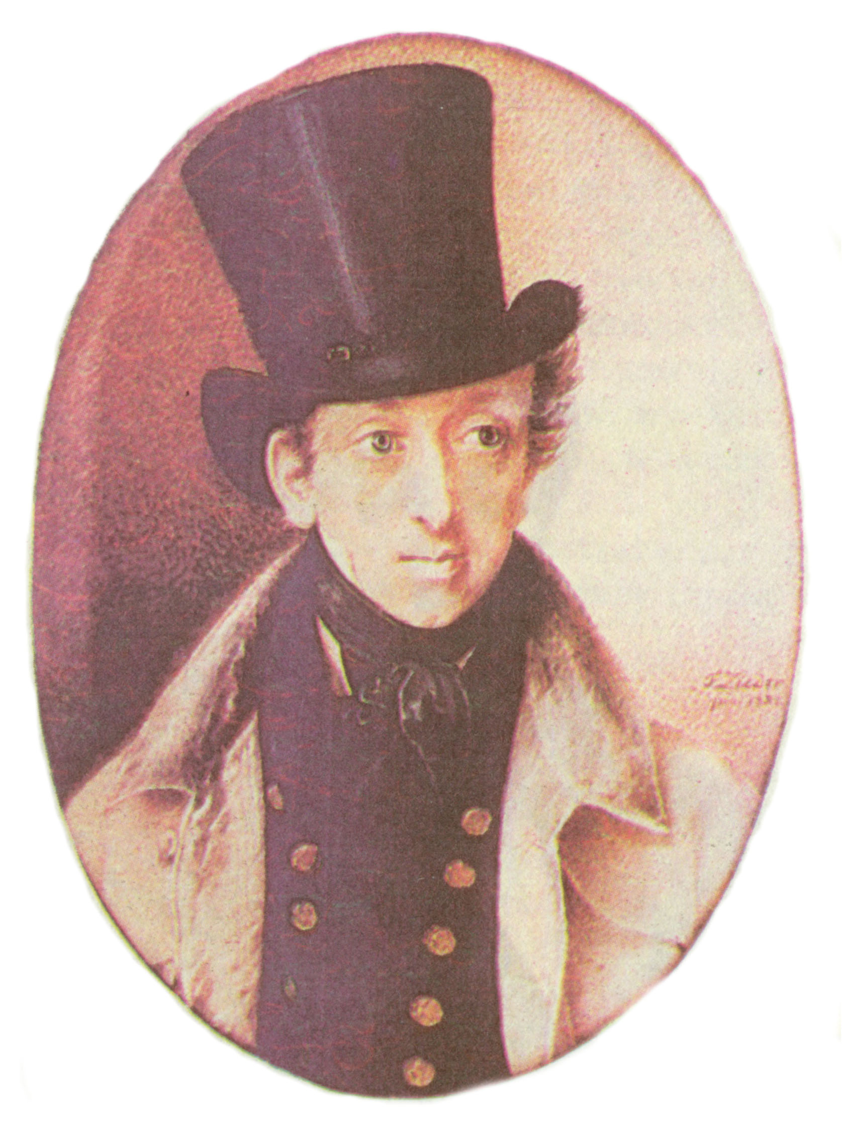 Никита Григорьевич Волконский (09.07.1781—18.12.1841), участник войны 1812 года, генерал-майор.